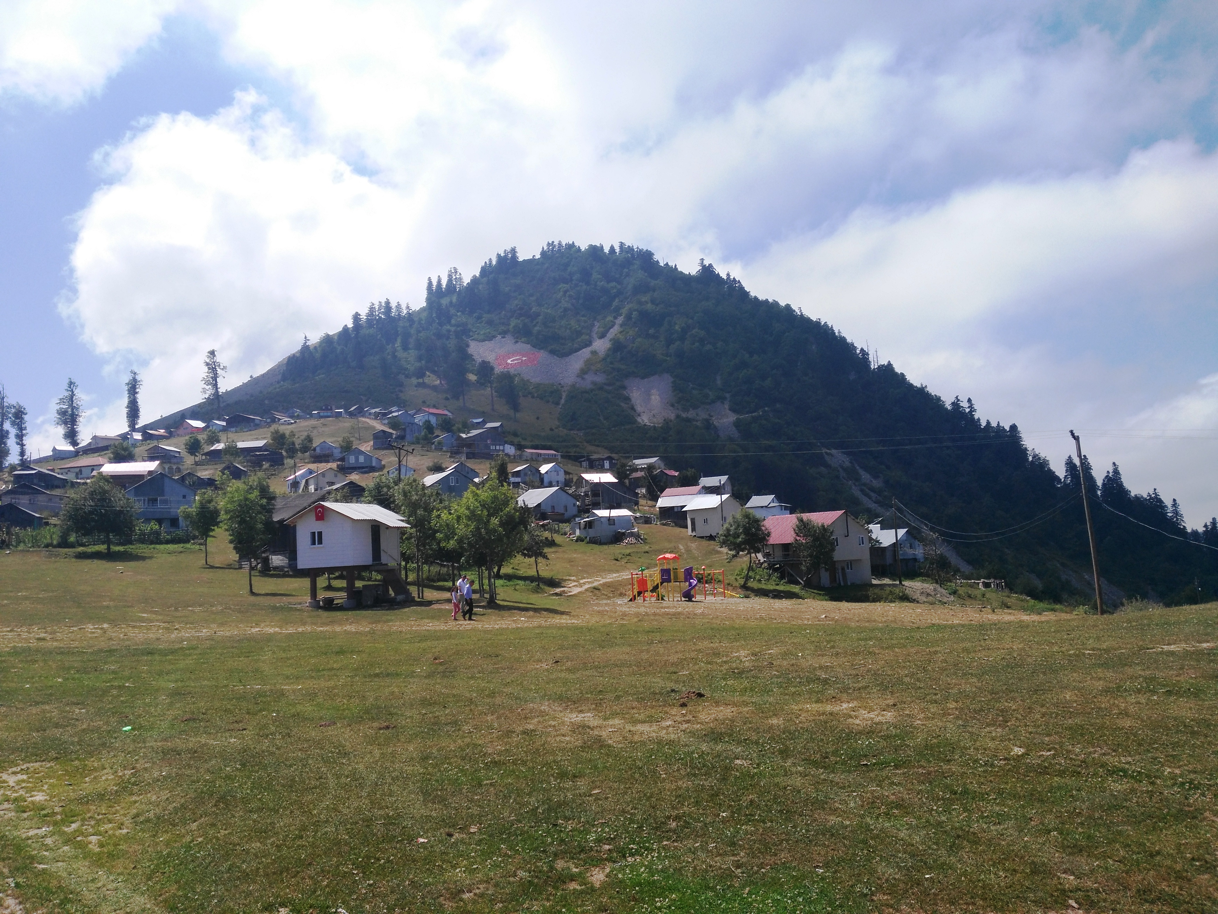 Sakarya ili, Hendek ilçesi, Dikmen Yaylası ve arkada Dikmen Tepesi